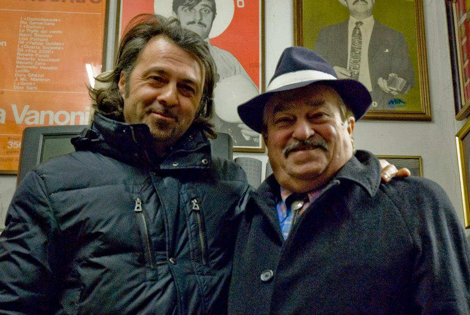 Lorenzo Schellino, in arte Riz Samaritano, con il figlio Luca Schellino, in arte Caschè, nel dicembre 2013 a Desio (MI).